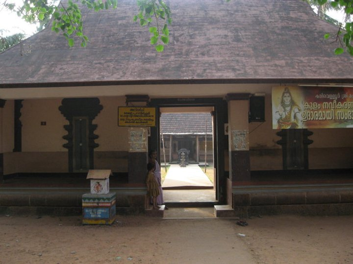 കരിവെള്ളൂർ ക്ഷേത്രം-ഗോപുരം